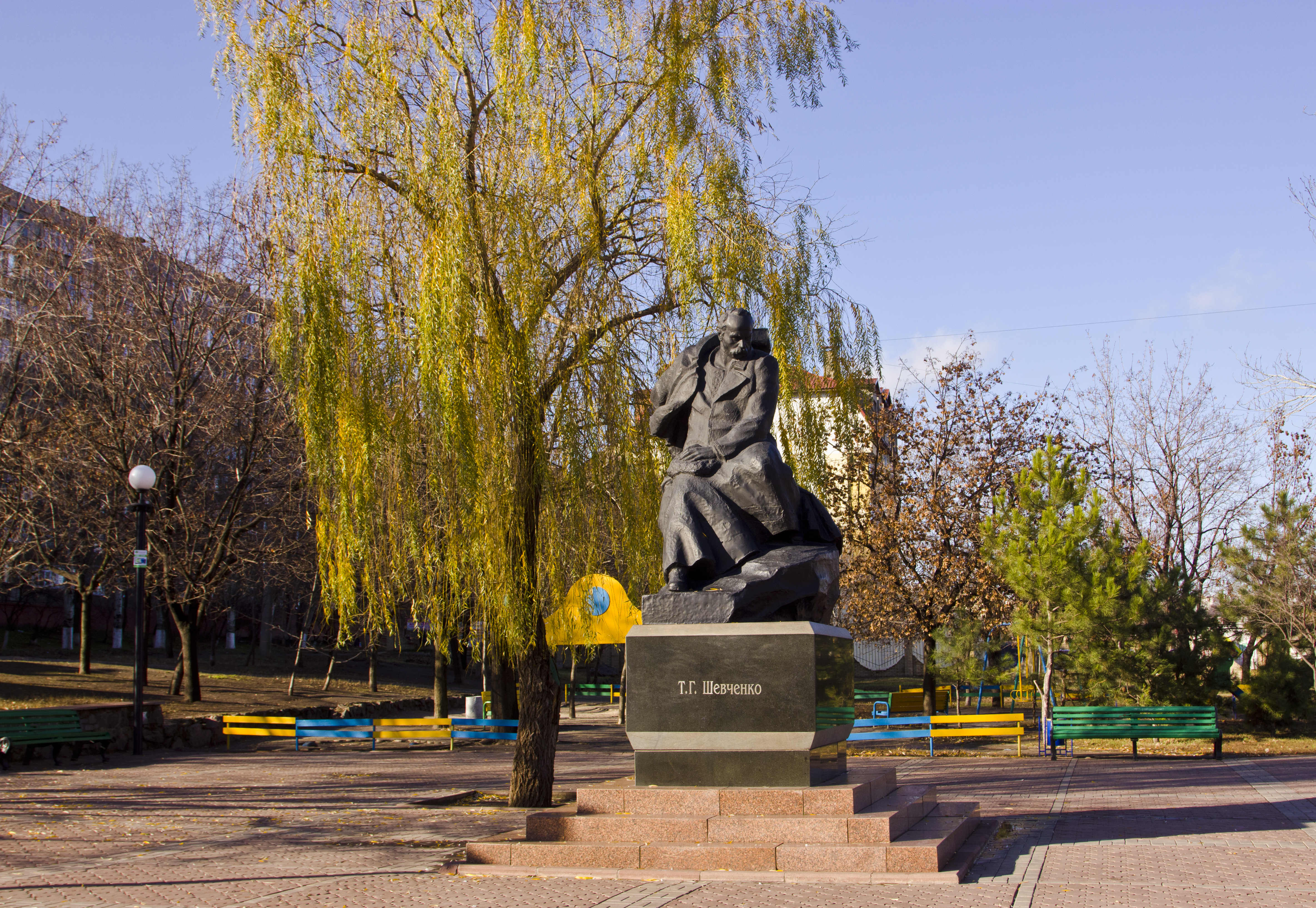 пам'ятник Тарасові Шевченку у м.Форт-Шевченко (Казахстан)